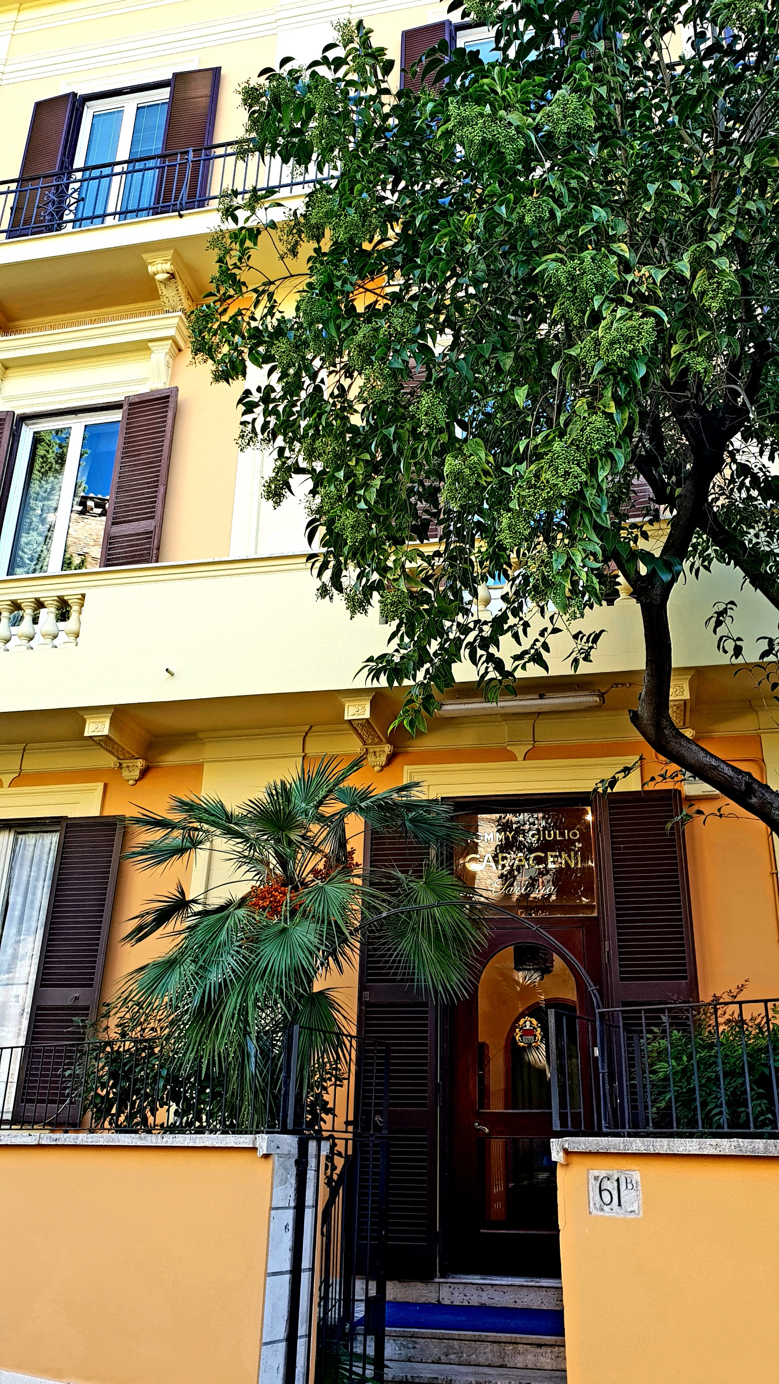 Sartoria Caraceni a Roma